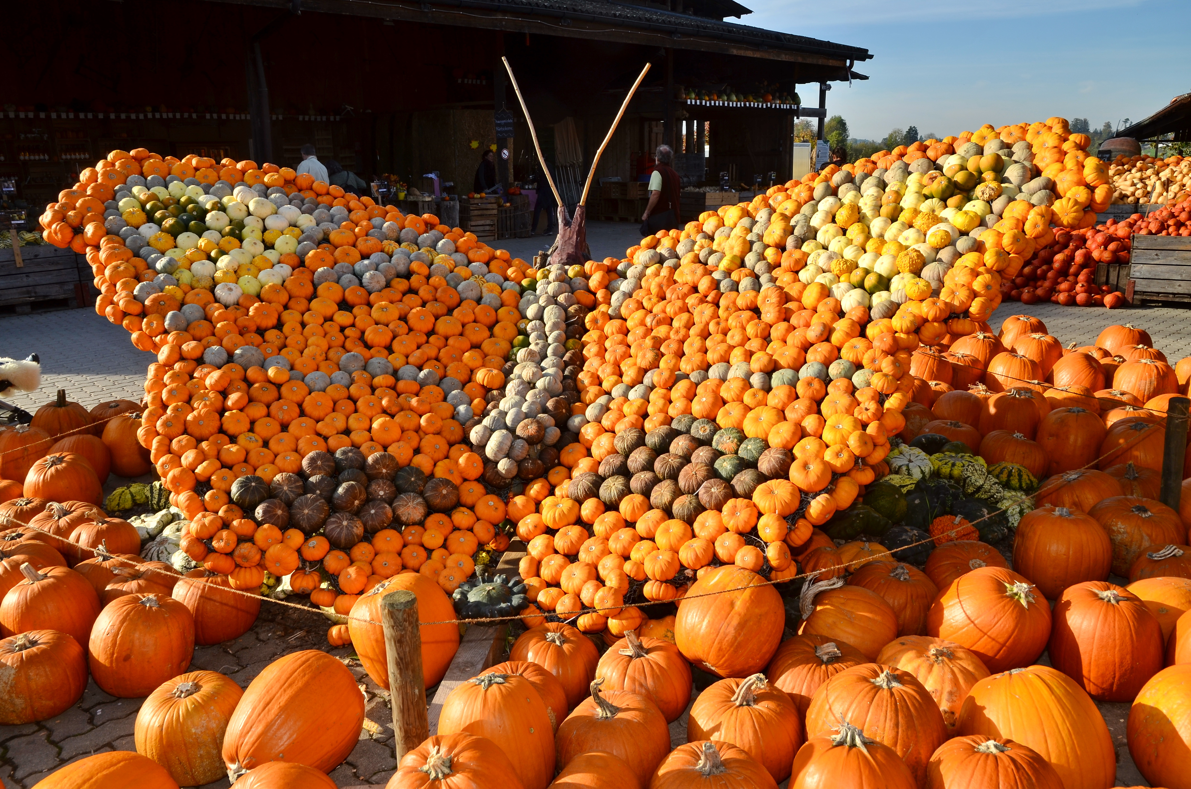 Kürbisausstellung (pumpkin festival), Jucker Farm (Juchhof) in Seegräben (Switzerland)